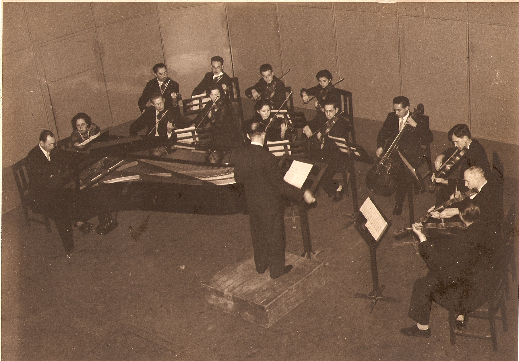 Orquesta de Camara U de C